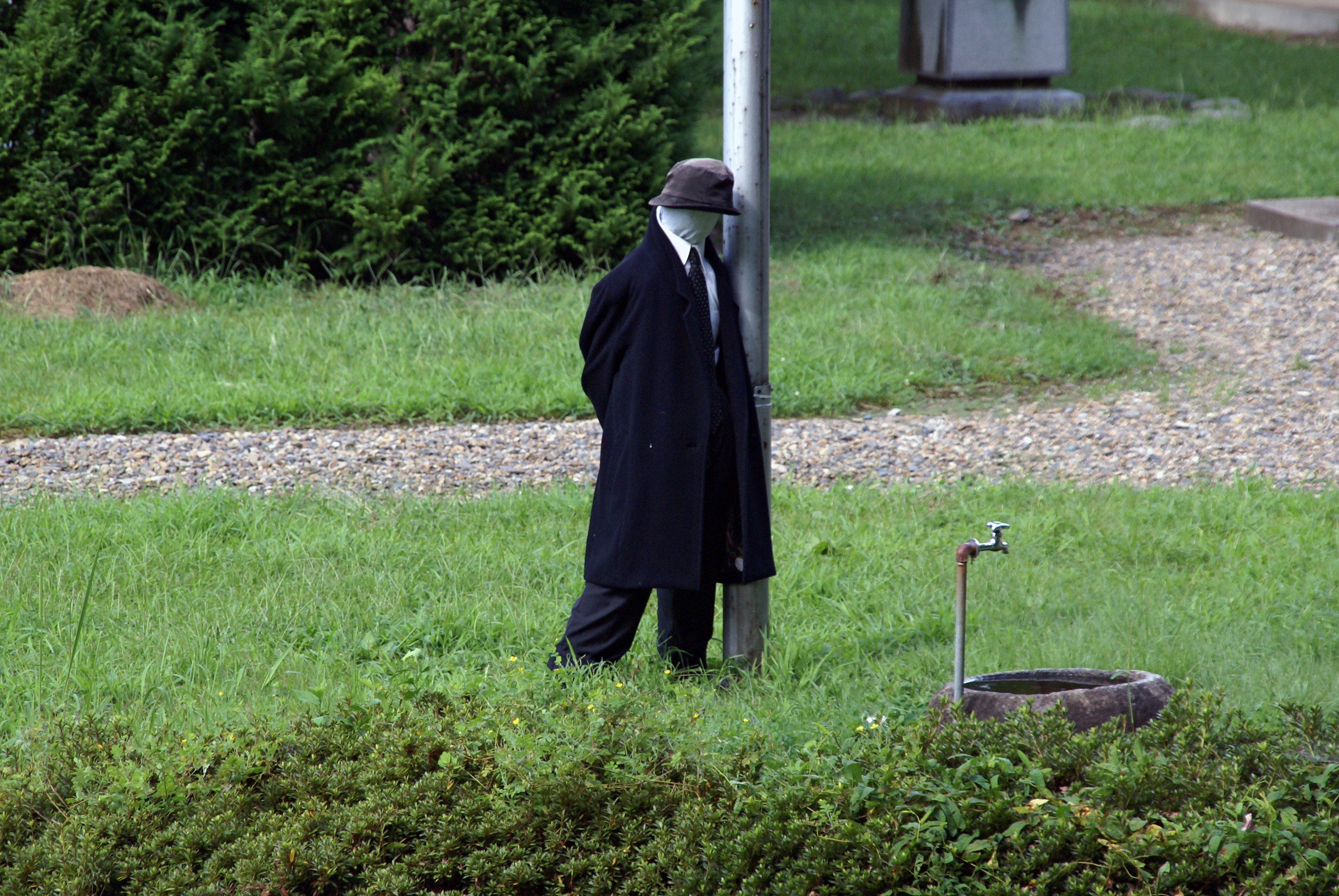 Sakura-Chijinkan in Hanamaki, Iwate prefecture, Japan